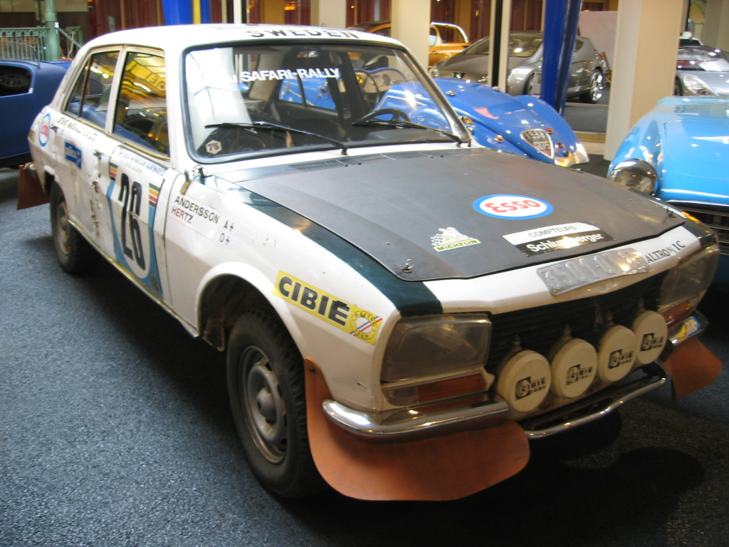 Peugeot 504 Rallye Raid - Musée Peugeot Sochaux